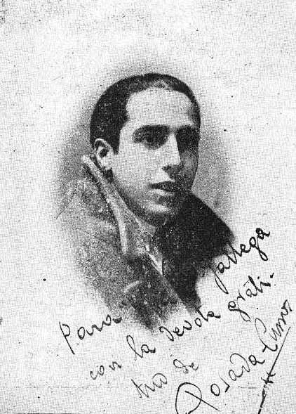 José G. Posada Curros, fotografía en Vida Gallega 1922